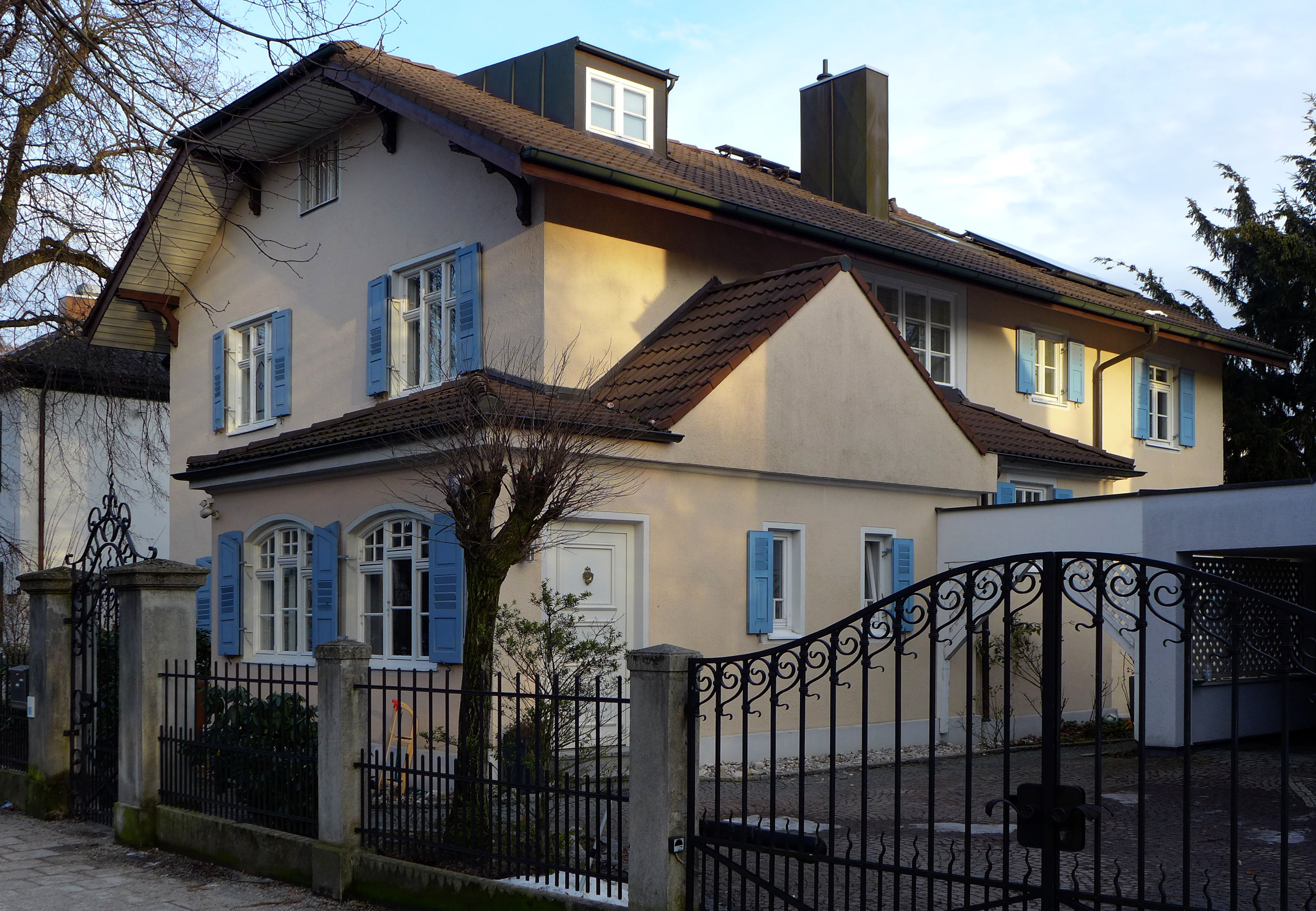 August-Exter-Str. 20, München